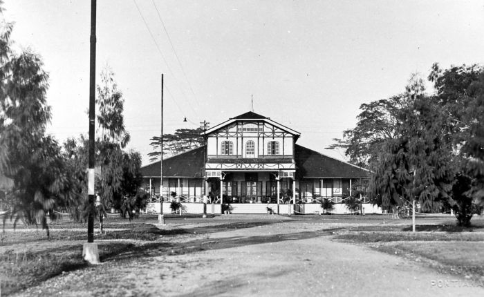 Repronegatief. De ambtswoning van de resident te Pontianak